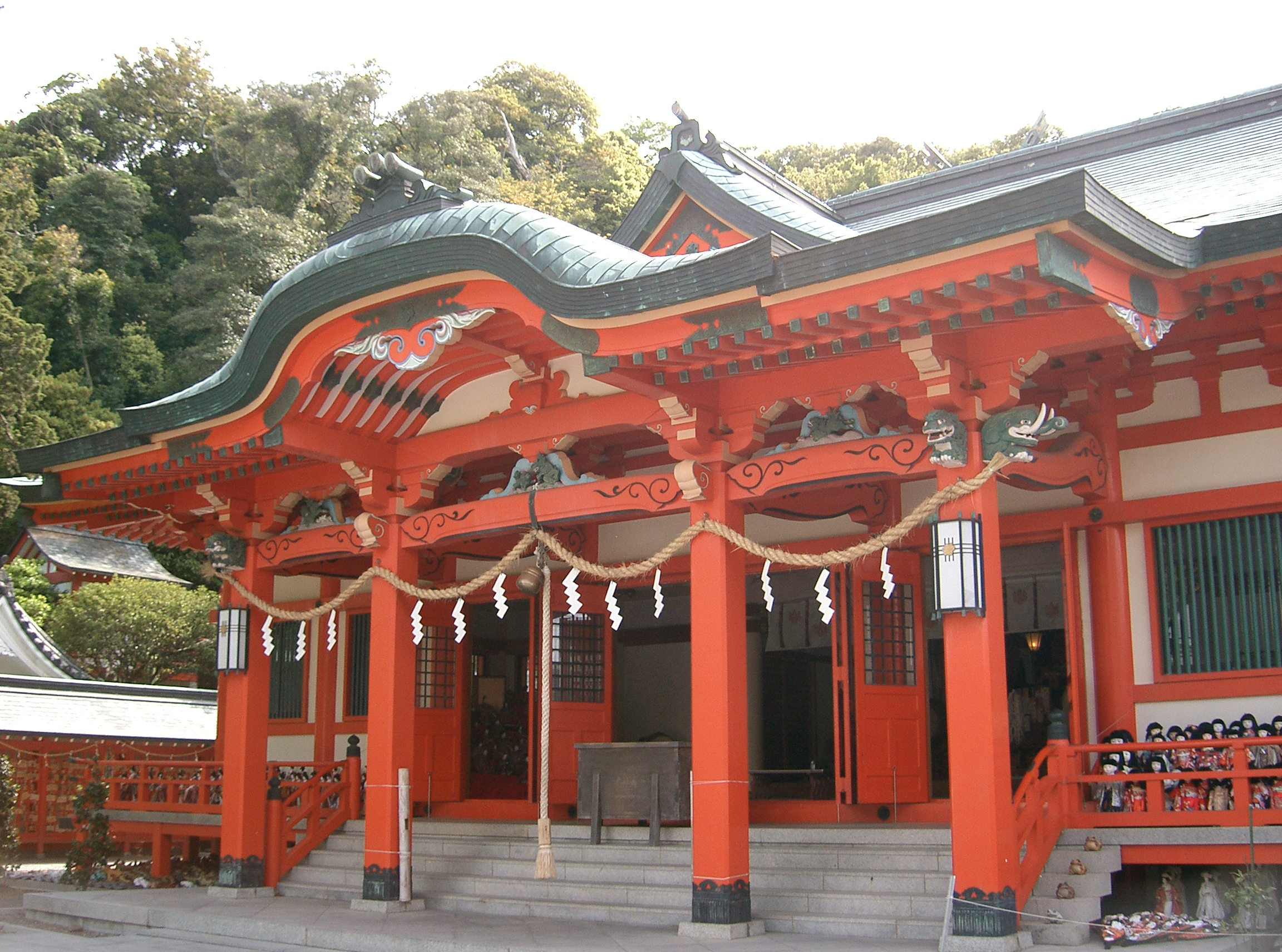 淡島神社 拝殿